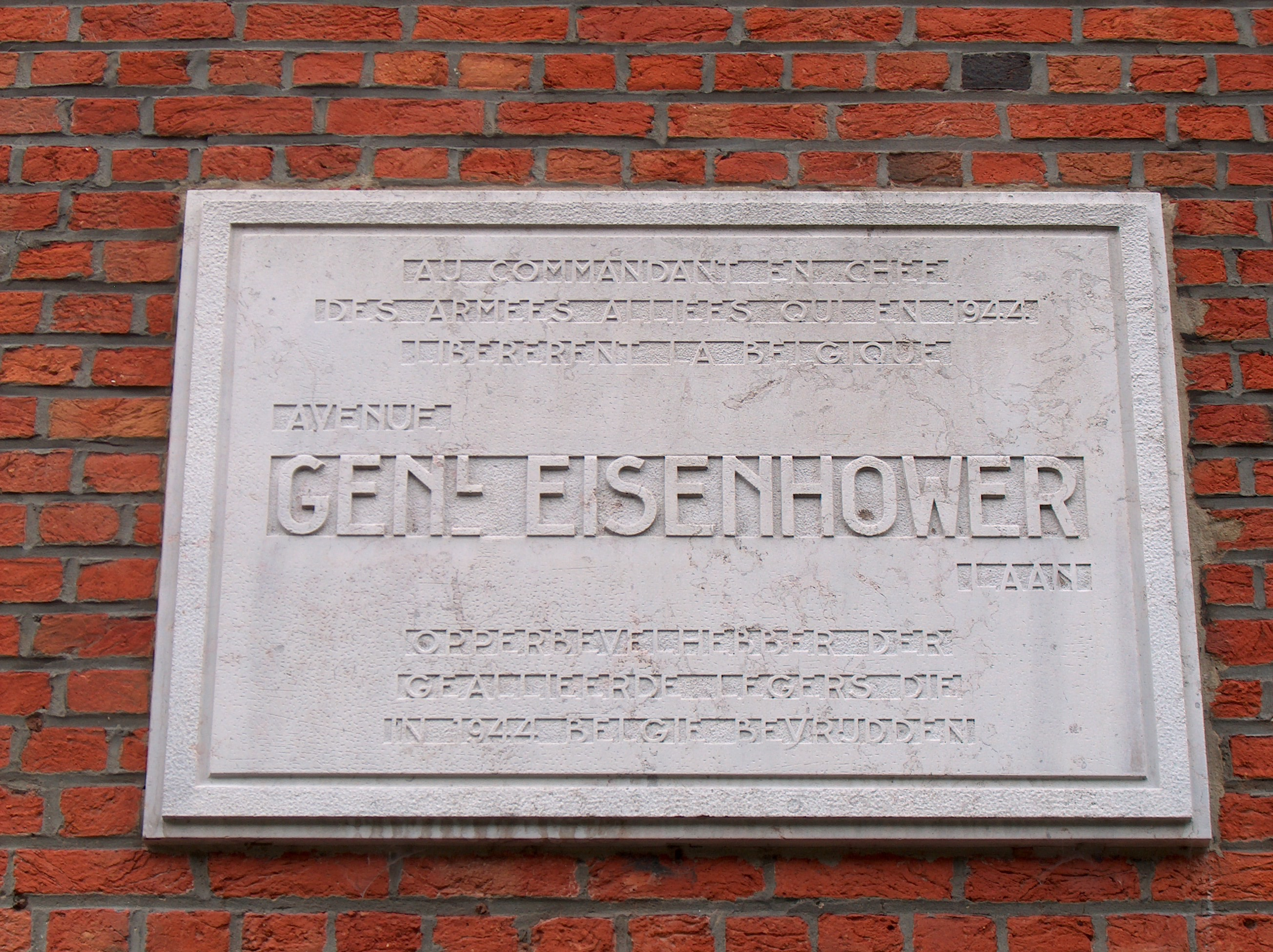 Bruxelles, Schaerbeek, avenue Général Eisenhower, plaque commémorative